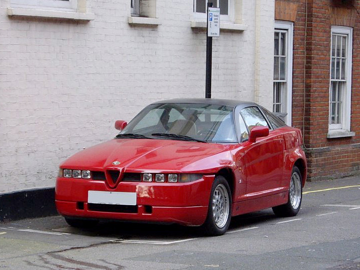 Alfa Romeo SZ